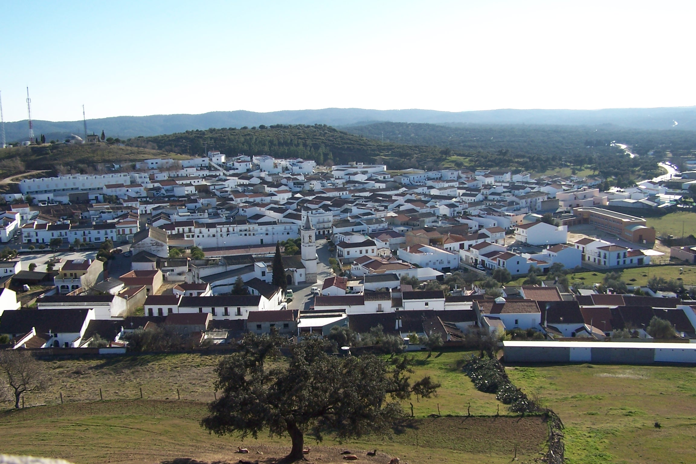 Panorámica de El Real de la Jara tomada desde El Castillo.